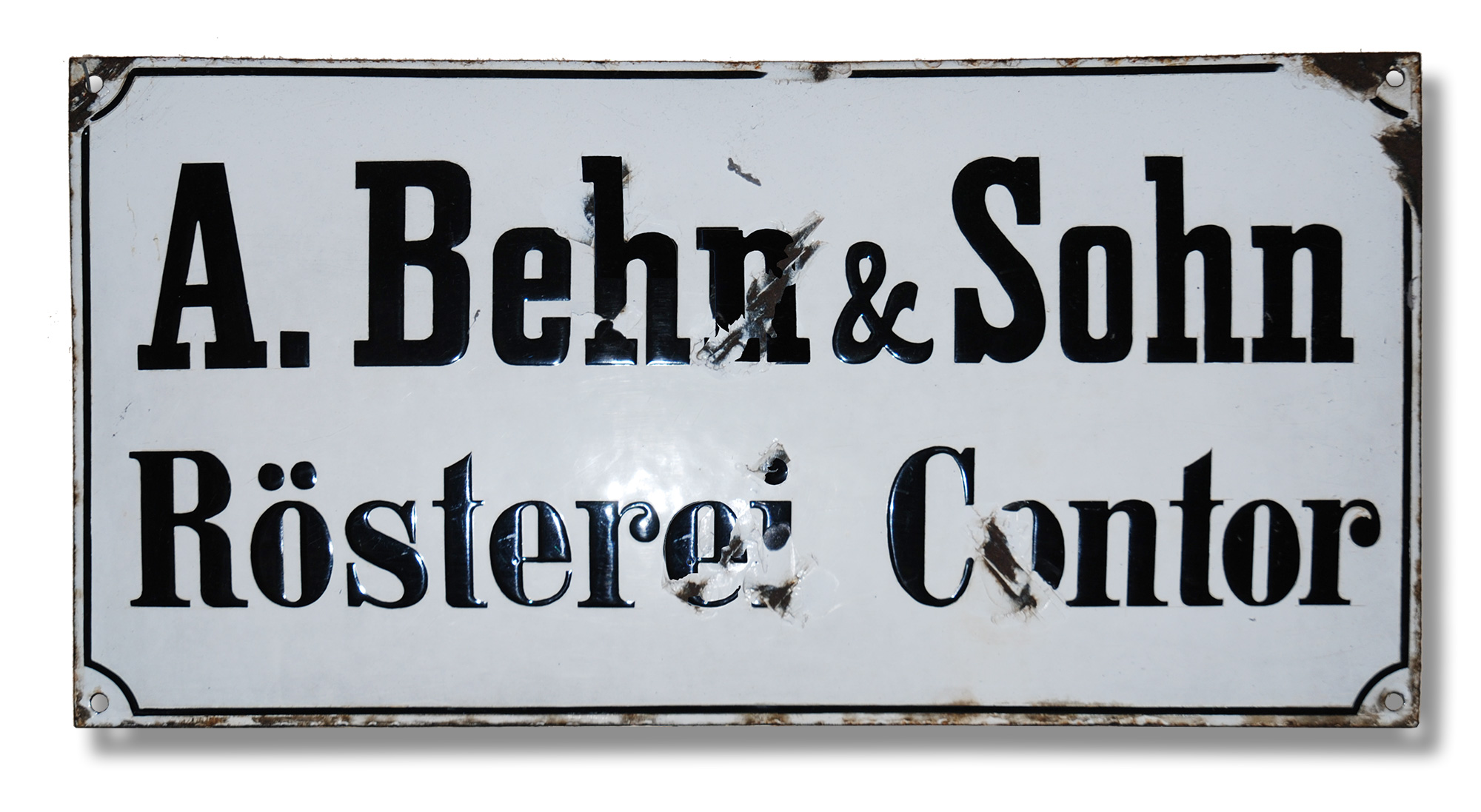 Firmenschild der Firma A. Behn & Sohn - Rösterei und Contor